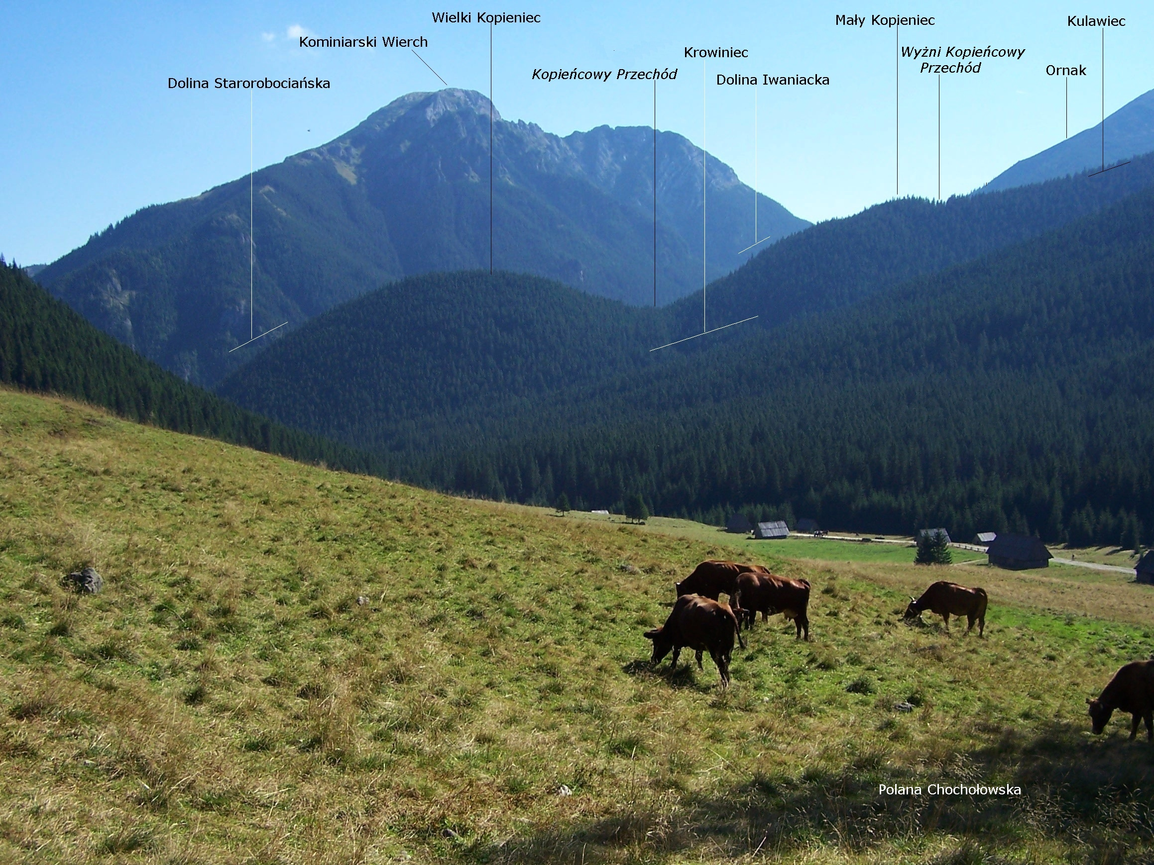 Polana Chochołowska w Tatrach